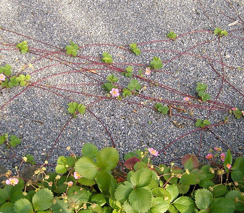 Fragaria × ananassa (Fragaria virginiana × Fragaria chiloensis) × Comarum palustre 'Pink Panda'